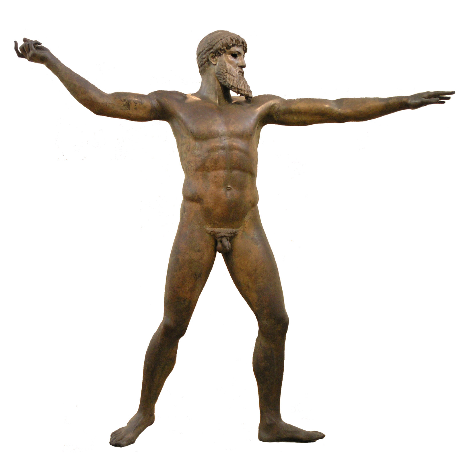 Statue de bronze de Zeus ou de Poséidon trouvée au large du Cap Artémision en Eubée. Le dieu étend son bras gauche vers l'avant de son corps et tient dans la main droite un trident ou un éclair. L'identification à Zeus ou Poséidon est controversée, la première restant plus probable. Il s'agit de l'une des rares statues originales de style sévère conservées, notables pour le rendu du mouvement et de l'anatomie. Vers 460 a. C. Hauteur : 2 mètres 09, largeur 2 mètres 10. Musée archéologique national, Athènes, n° Br.15161.